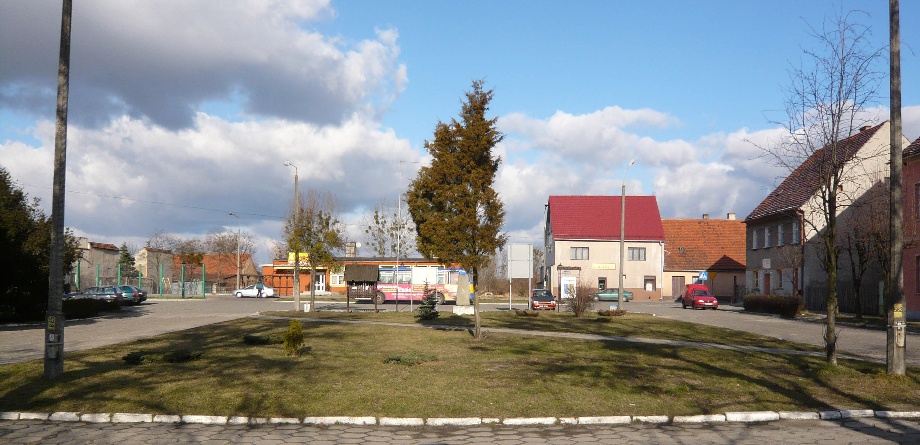 Rynek w Skorogoszczy widok od strony przystanku